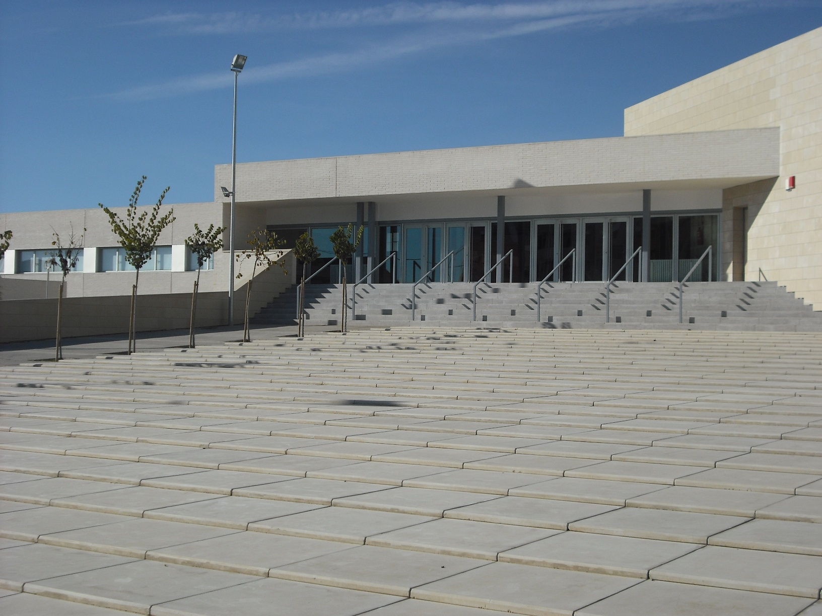 Entrada del Tercer Instituto de Villena